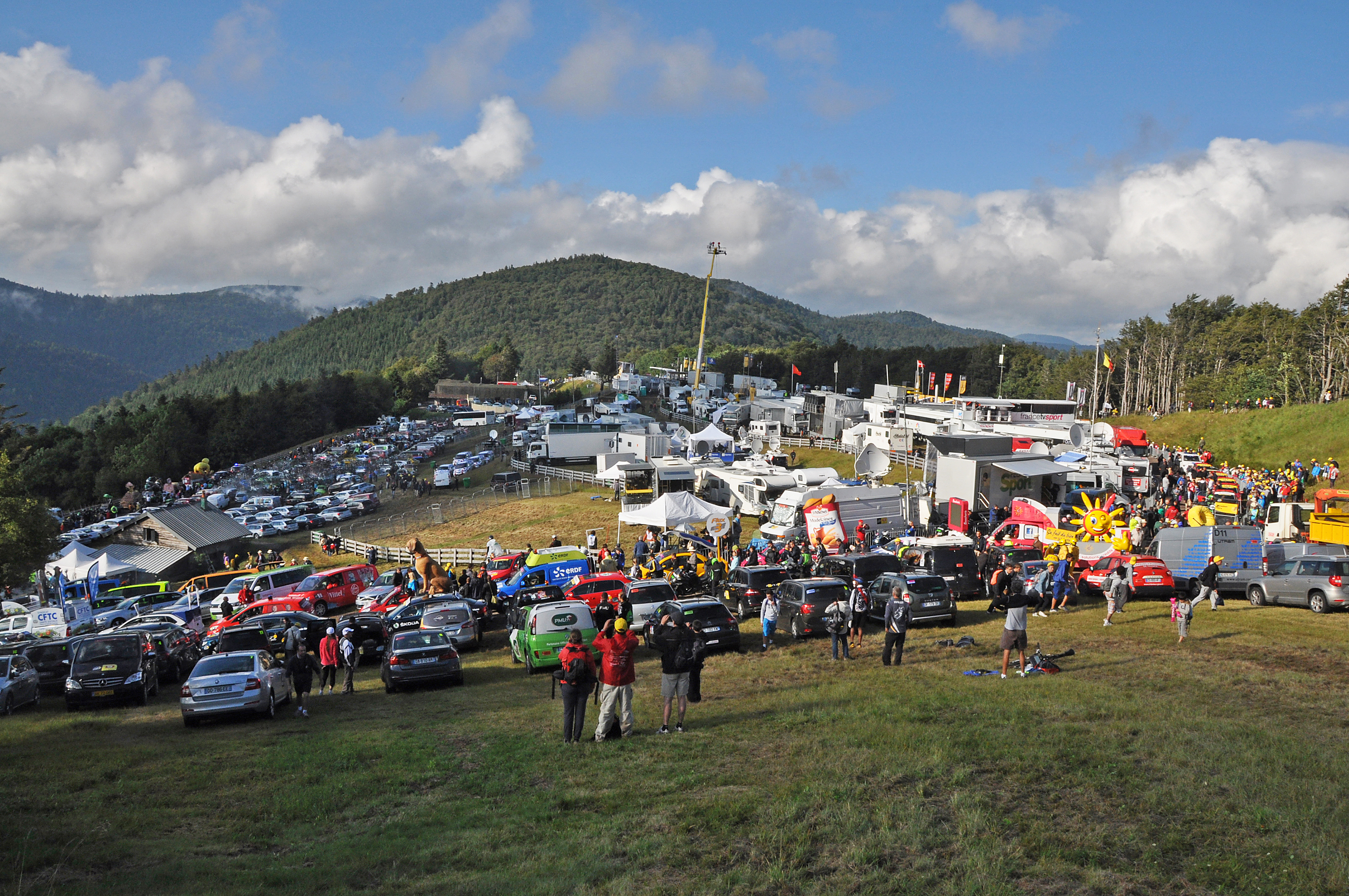 Vue d'ensemble du parc de l'organisation du Tour de France, 14 juillet 2014 - Planche des Belles Filles (Haute-Saone)